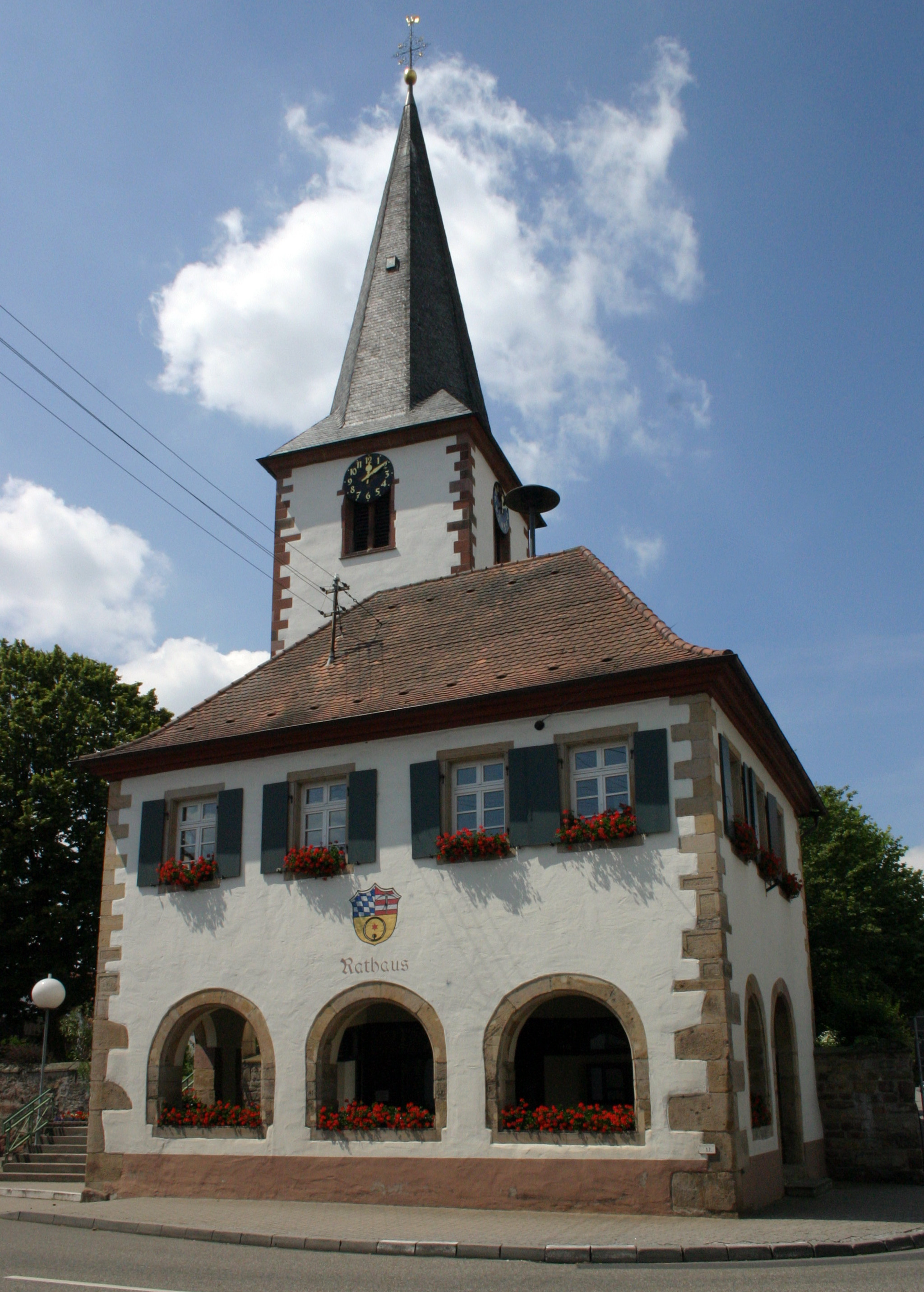 Ottersheim, Germersheimer Straße 3; Katholische Pfarrkirche St. Martin; fünfachsiger Saalbau, 1618, 1789 erweitert, gotischer ehemaliger Chorturm; Sandsteinkruzifix über Adam und Eva, bezeichnet 1747. Ottersheim, Germersheimer Straße 1; Rathaus, Walmdachbau, Erdgeschosshalle bezeichnet 1555, Obergeschoss wohl aus dem 18. Jahrhundert.